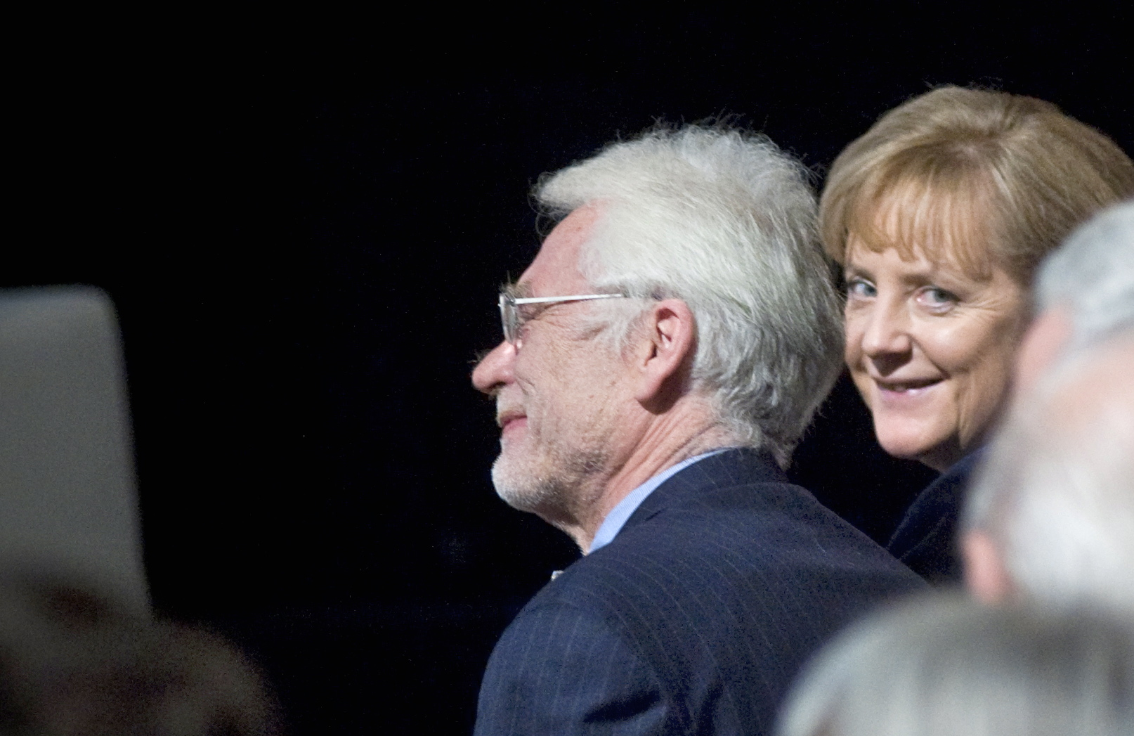 Auftaktveranstaltung der Einstein Stiftung Berlin: Bundeskanzlerin Angela Merkel/ Senator Prof. Dr. E. Jürgen Zöllner